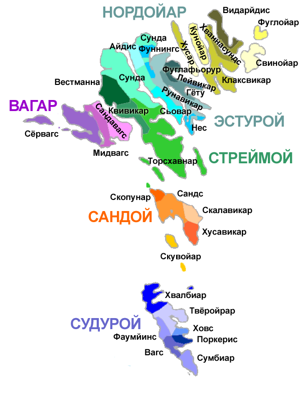 Муниципалитеты Фарерских островов